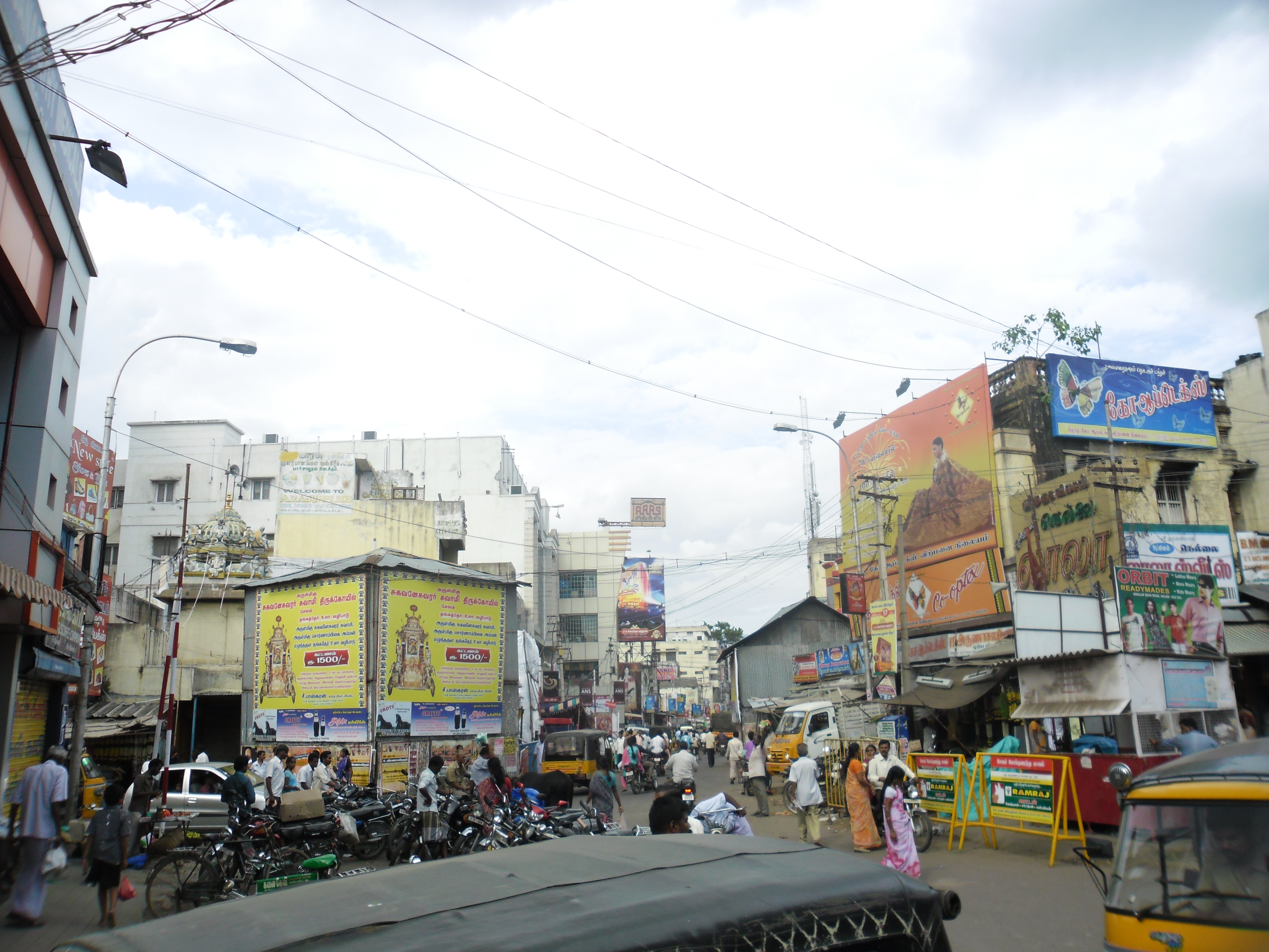 சேலத்திலுள்ள சின்னக்கடைவீதி